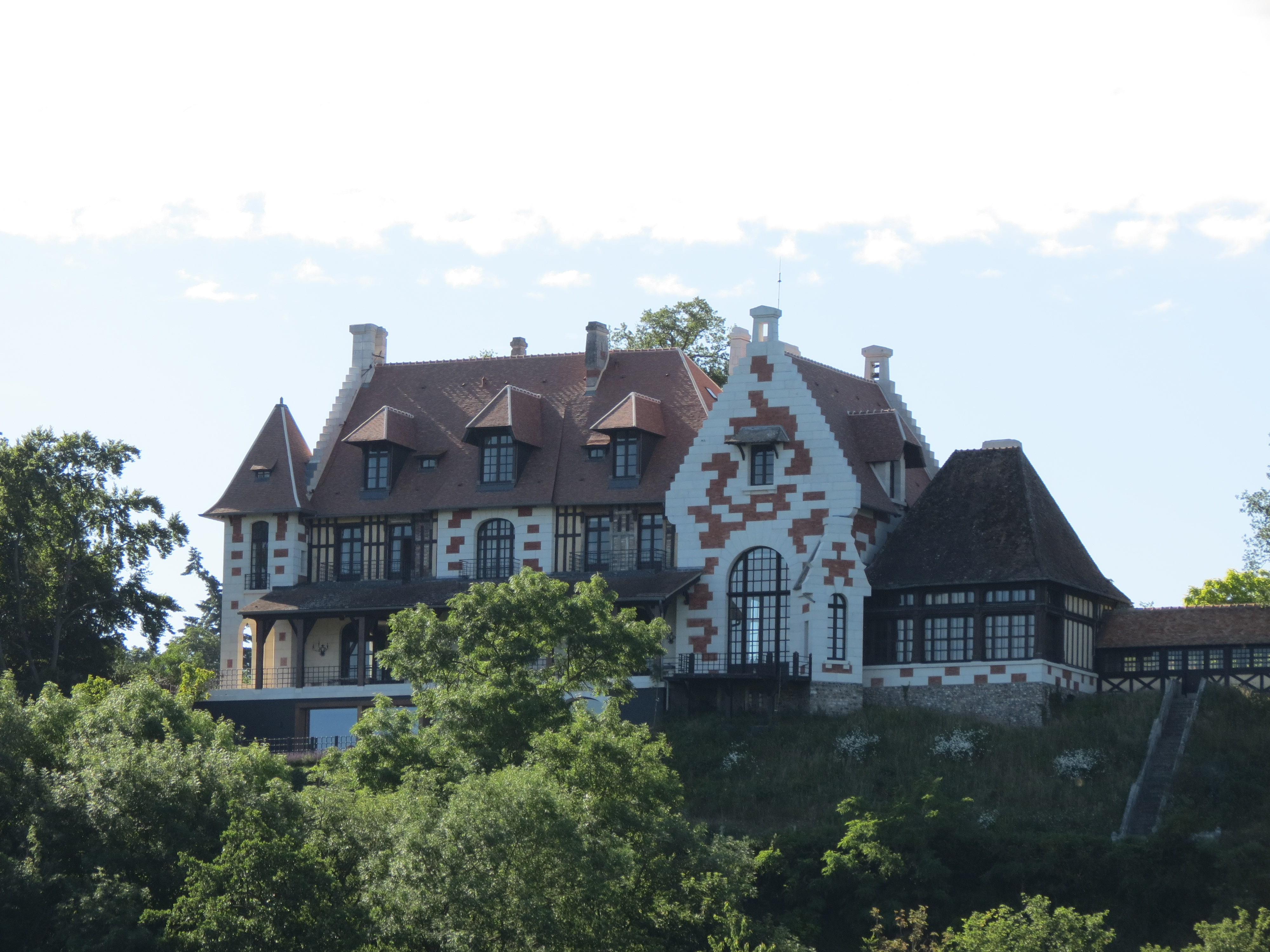 Château Renault vu depuis Porte-Joie.